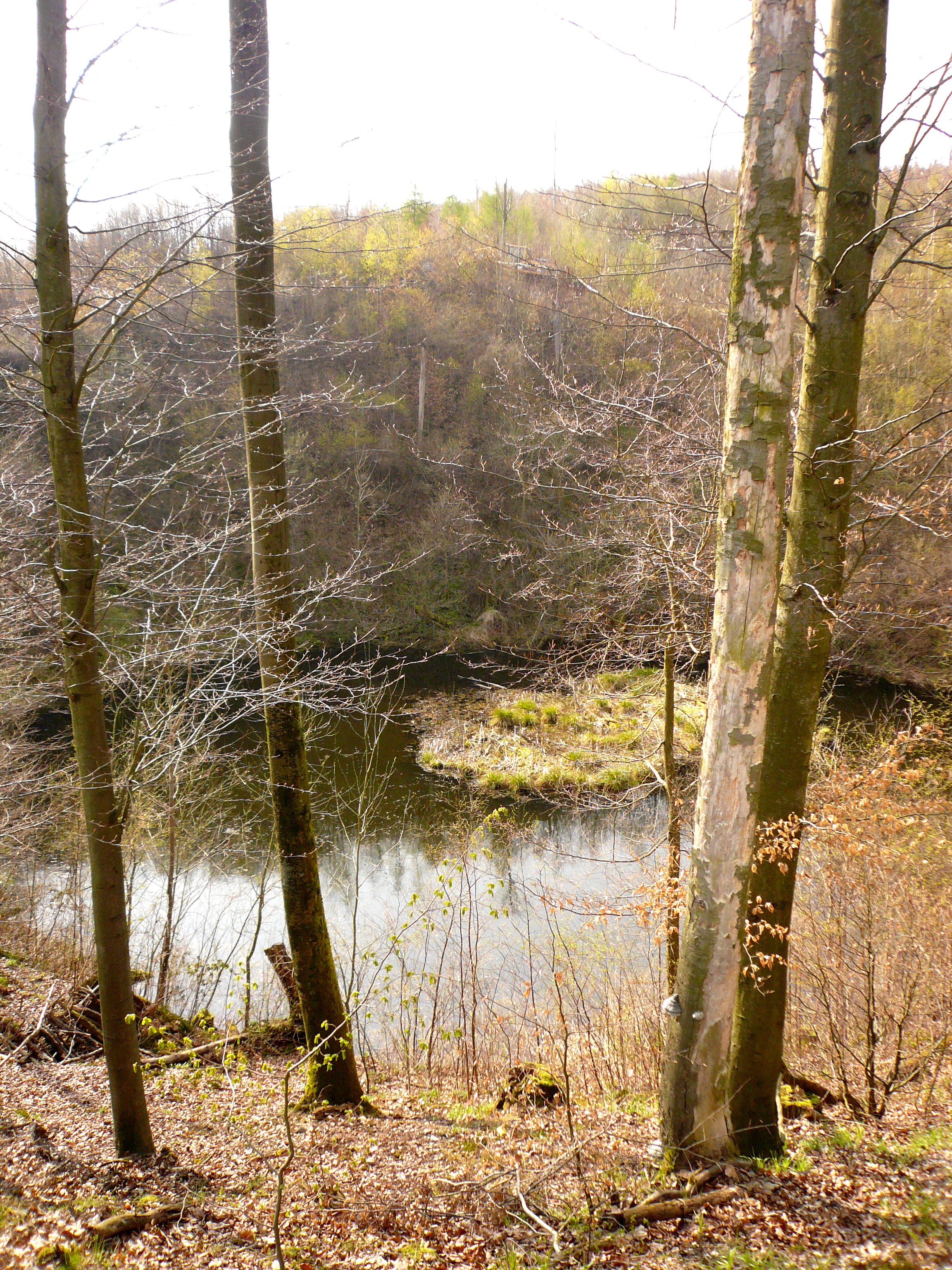 "Schwimmende Insel" am Rotenberg bei Pöhlde, Südniedersachsen. Erdfallsee am Karstwanderweg mit Torfinselbildung, die allerdings wieder festgewachsen ist.